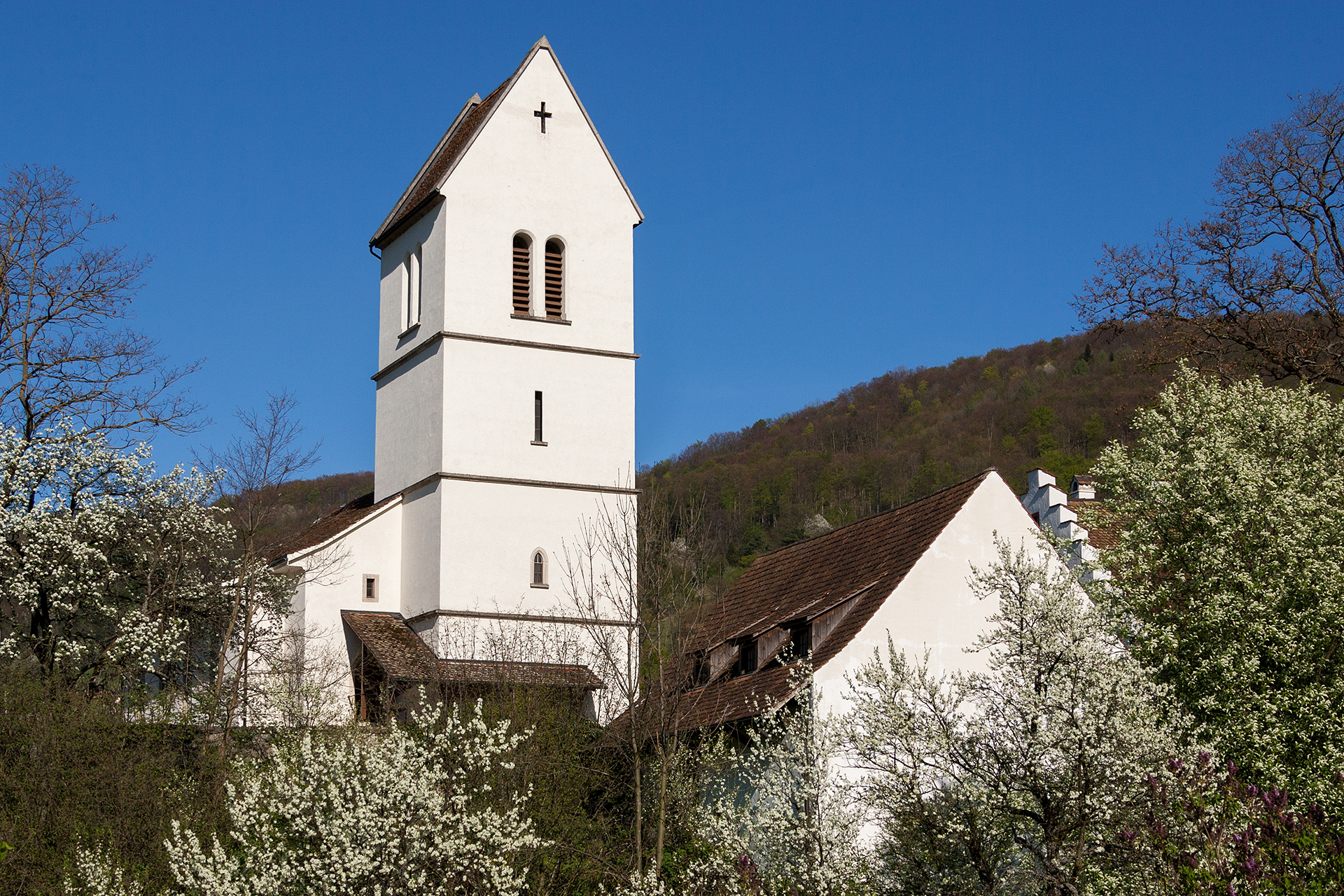 Kirche in Oltingen (BL)